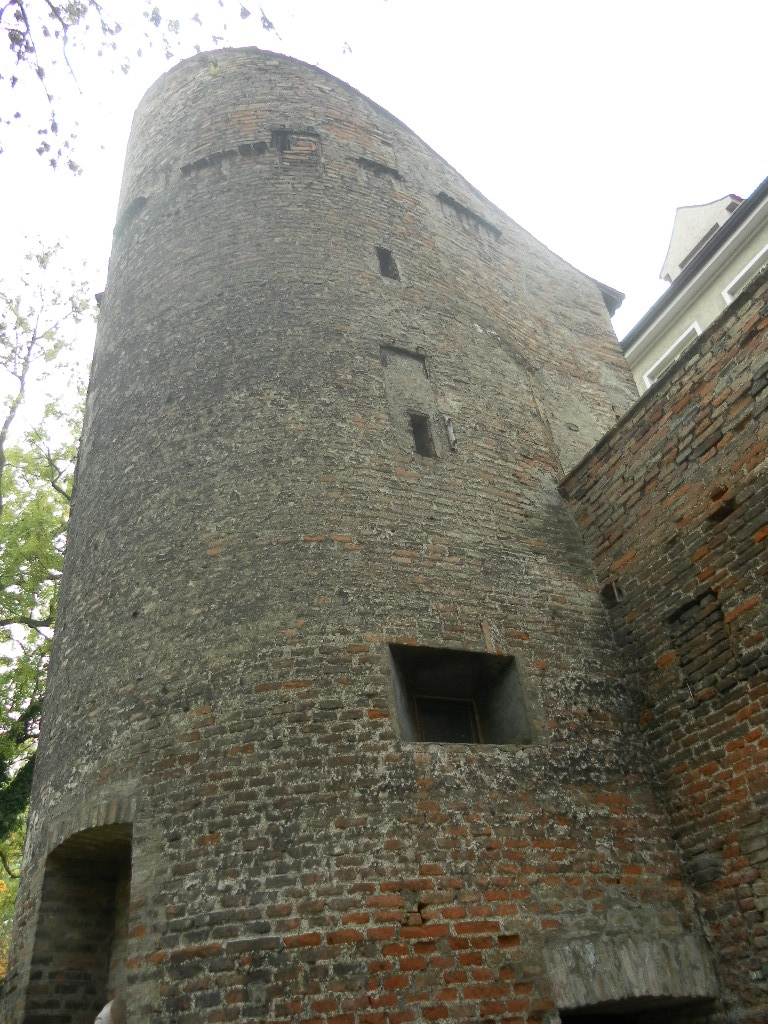 Augsburg: Wehrturm Dohlenturm der östlichen Mauer der Unteren Stadt, hinter der Mauer das Studienseminar St. Joseph bei St. Stephan am Schwedenweg